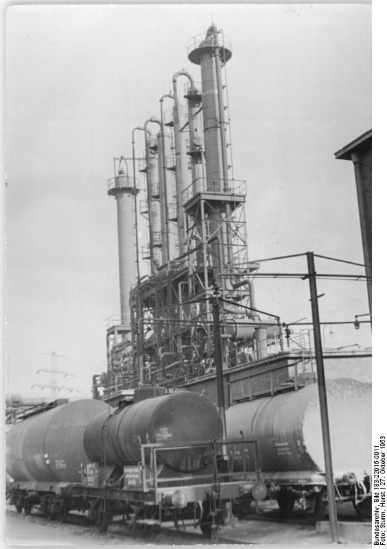 Zentralbild-Sturm 27.10.1953 Zi-Qu Sag-Betrieb-Buna in Schkopau wird den Werktätigen unserer Republik übergeben.Bei den Verhandlungen der Deutschen Regierungsdelegation vom 20.und 22.8.1953 in Moskau,die im Sinne tiefer Freundschaft und in voller Gleichberechtigung der beiden Staaten verlief,kam die sowjetische Regierung zu dem Entschluß, die Chemischen Werke Buna in Schkopau, die zu den größten und wichtigsten Betrieben unserer Republik gehöhren, wie die anderen 32 Sag-Betriebe am 1.1.1954 kostenlos den Werktätigen unserer Republik zu übergeben. UBz: Blick auf die Destillationsanlage.